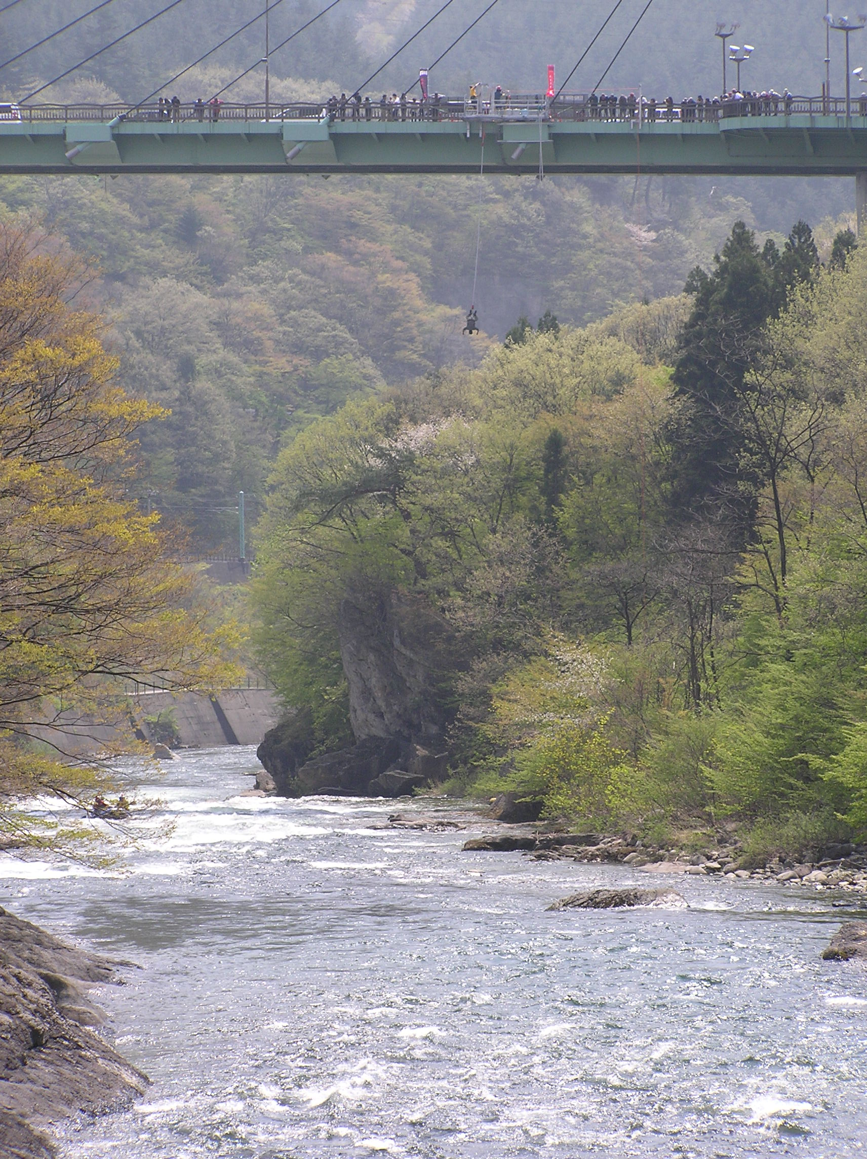 Bungee jumping Suwakyooohasi-bridge 諏訪峡大橋、バンジージャンプ